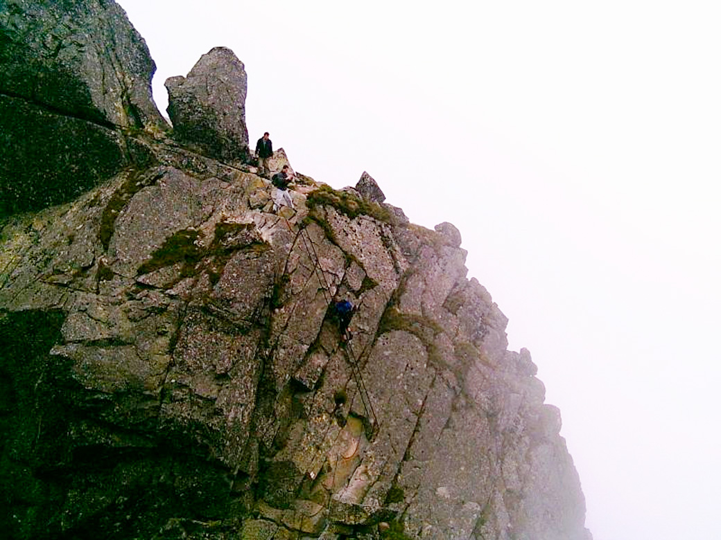 Słynna drabinka nad Kozią przełęczą - widok z drogi na Kozie Czuby